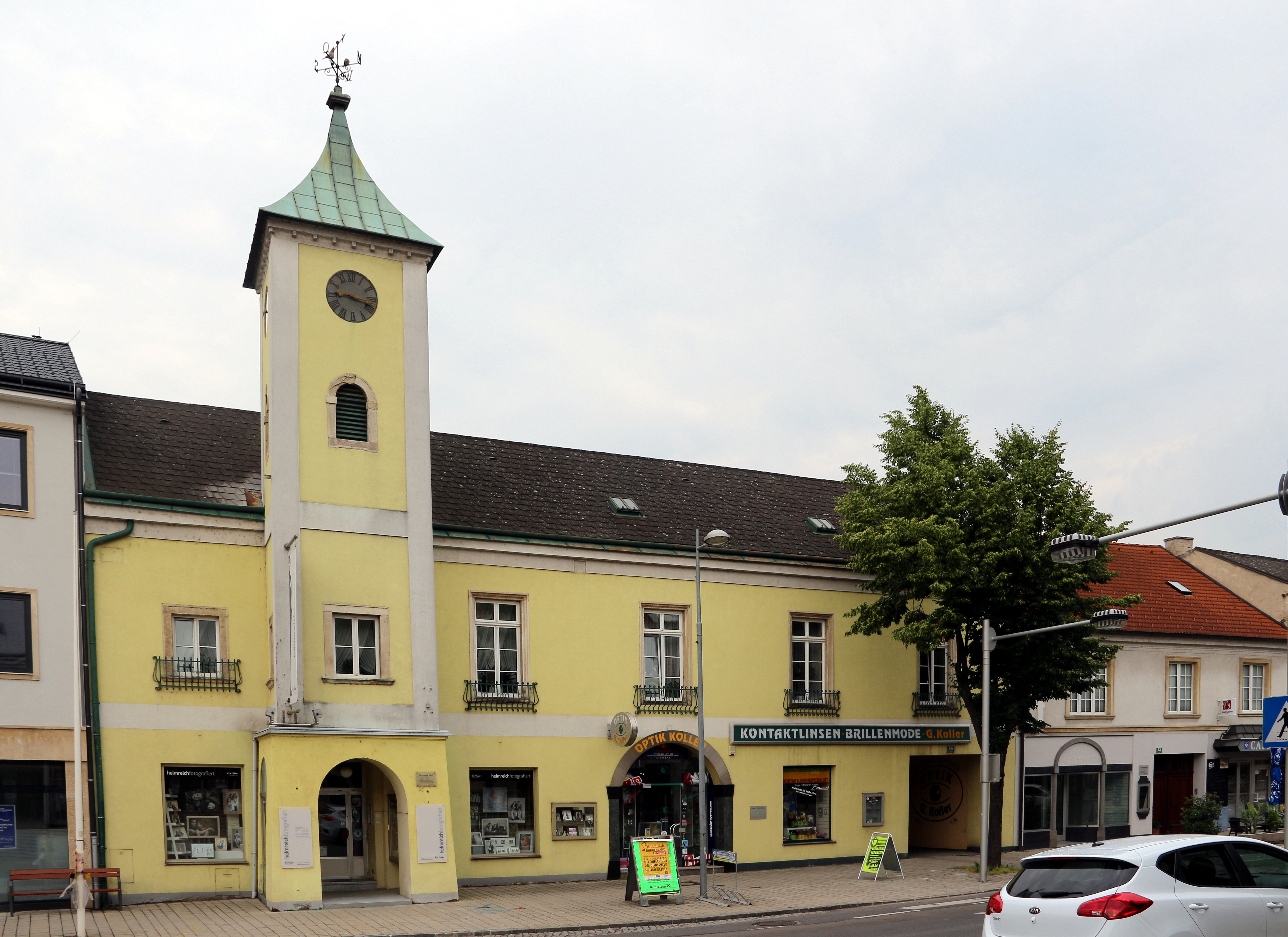 Brenner Hof (auch "Brennerscher Edelhof") an der Hauptstraße in Neusiedl am See, Burgenland.